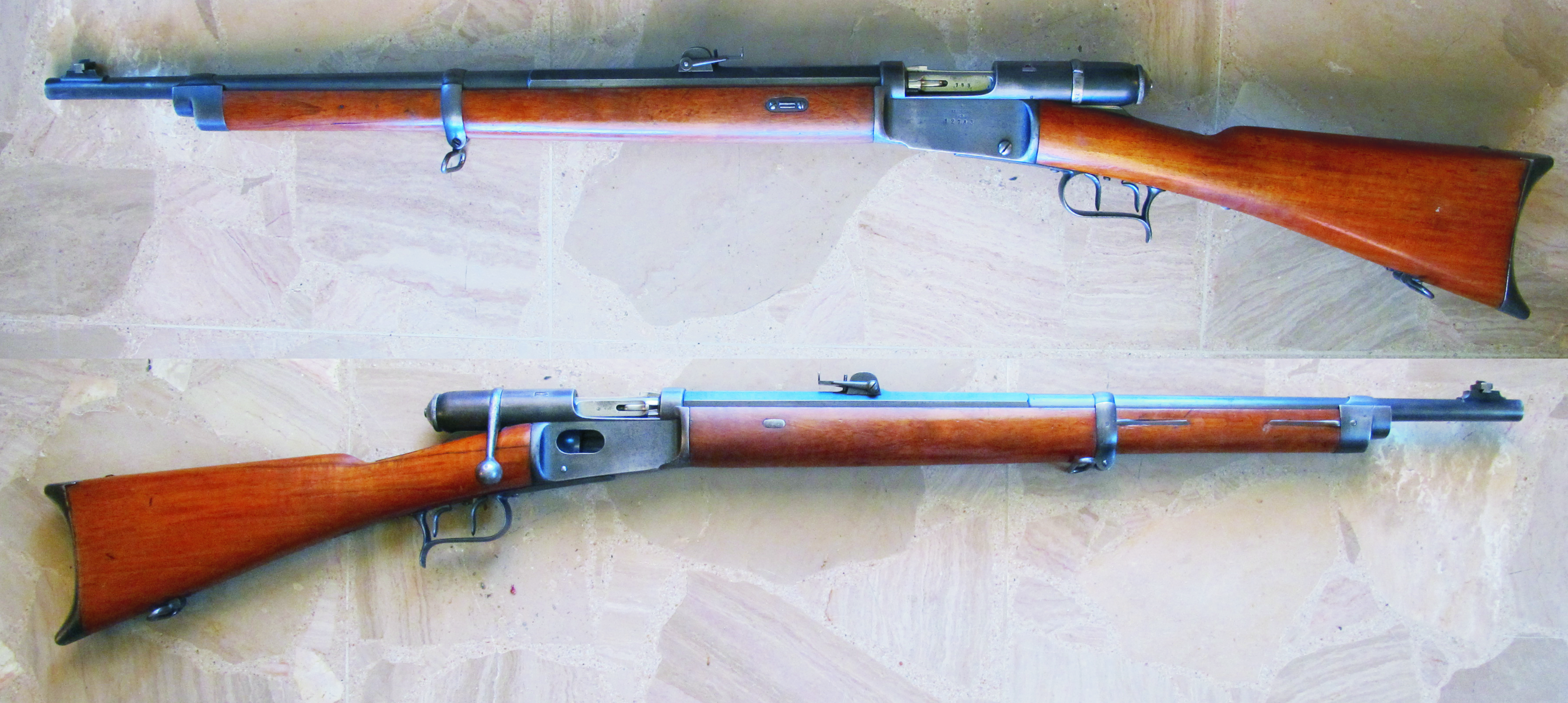 Carabine mod. 1881 convertie pour le tir de la munition .22lr. Modification de la culasse, du percuteur, de l'extracteur. Le fût à été raccourci, le magasin tubulaire et la baguette supprimés. Un nouveau canon a été ajusté sur la boîte de culasse original. Transformation effectuée par l'armurier Forney à Lausanne